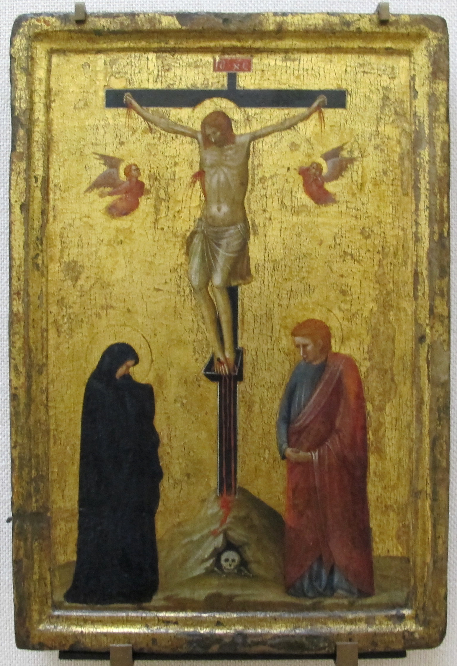 Pittura italiana del Trecento, Louvre